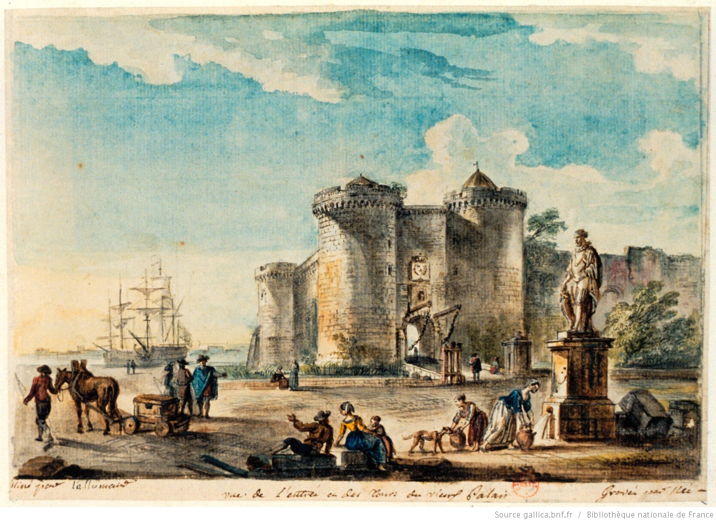 Rouen, vue de l'entrée et des Tours du vieux palais